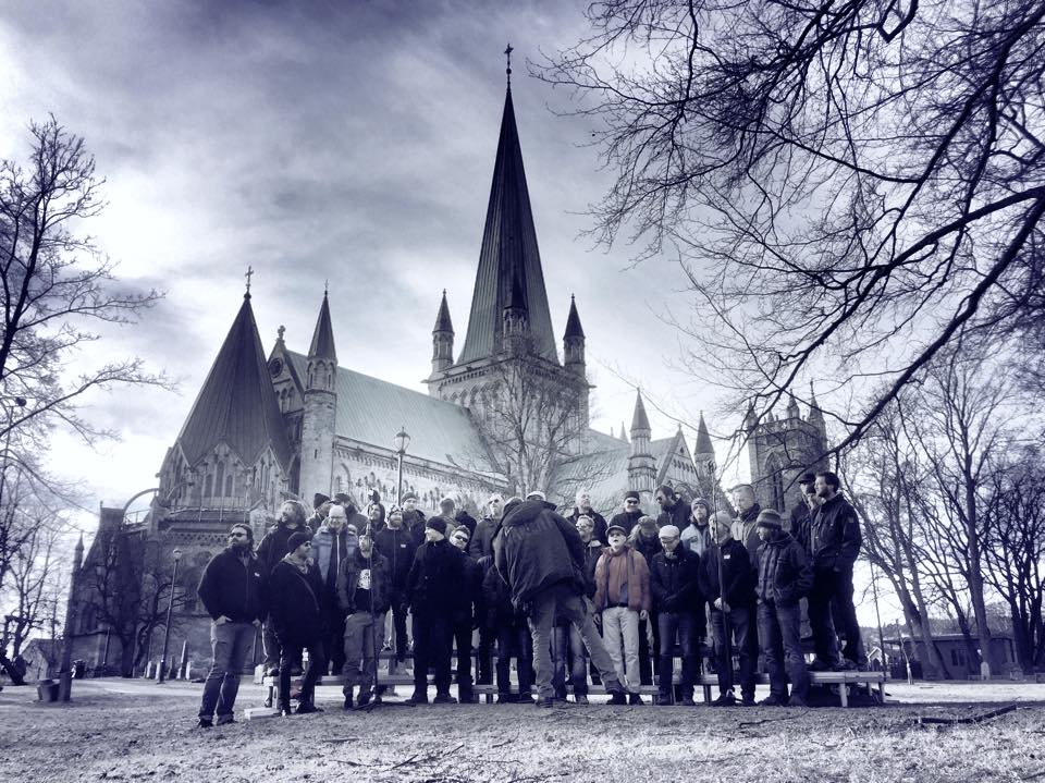 Svartlamon Hardkor med oppstilling foran Nidarosdomen ifbm. innspilling av TV-serien Punx, februar 2015. Foto: Lars Haugdal Andersen